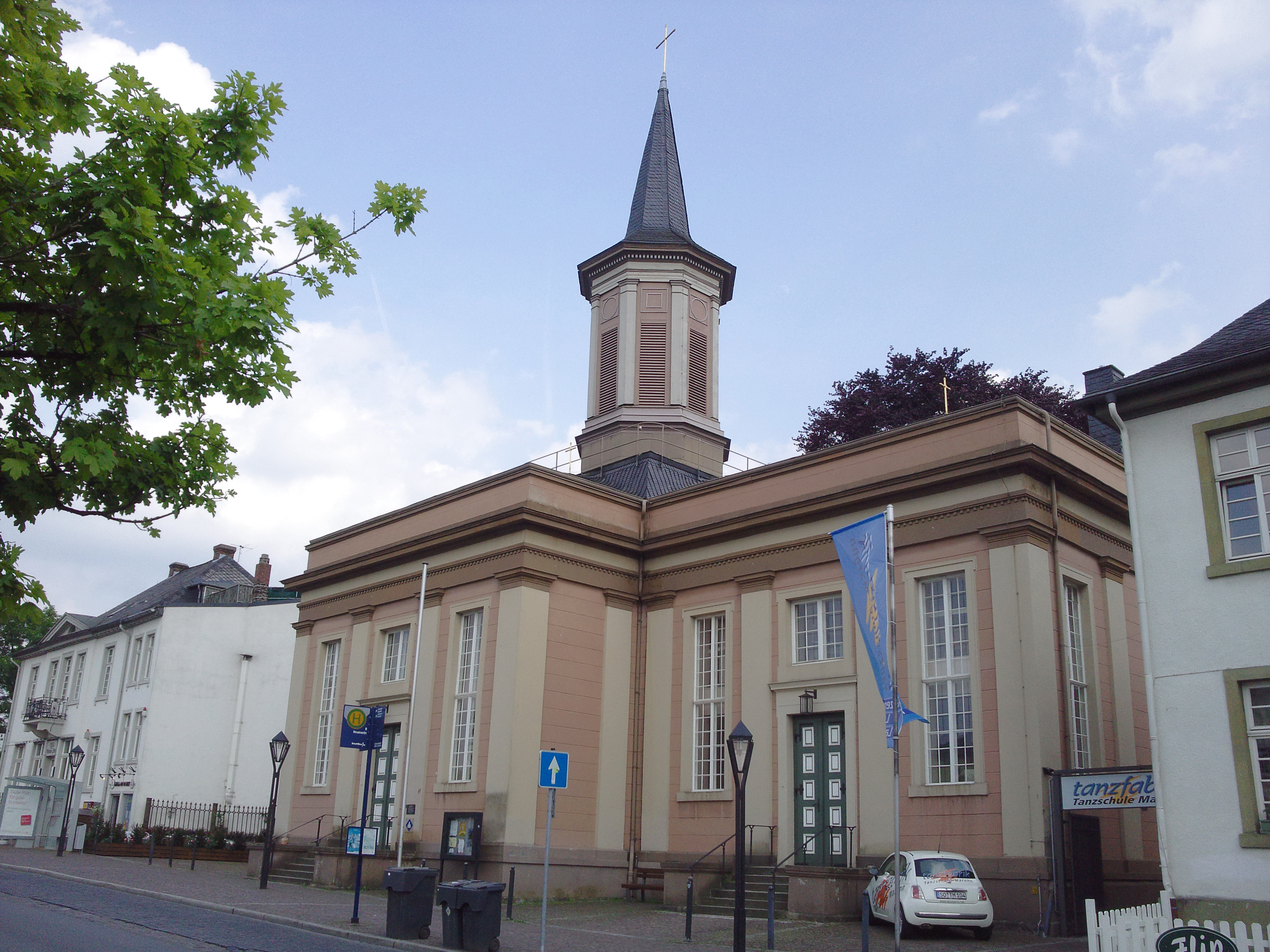 Auferstehungskirche in der Stadt Arnsberg